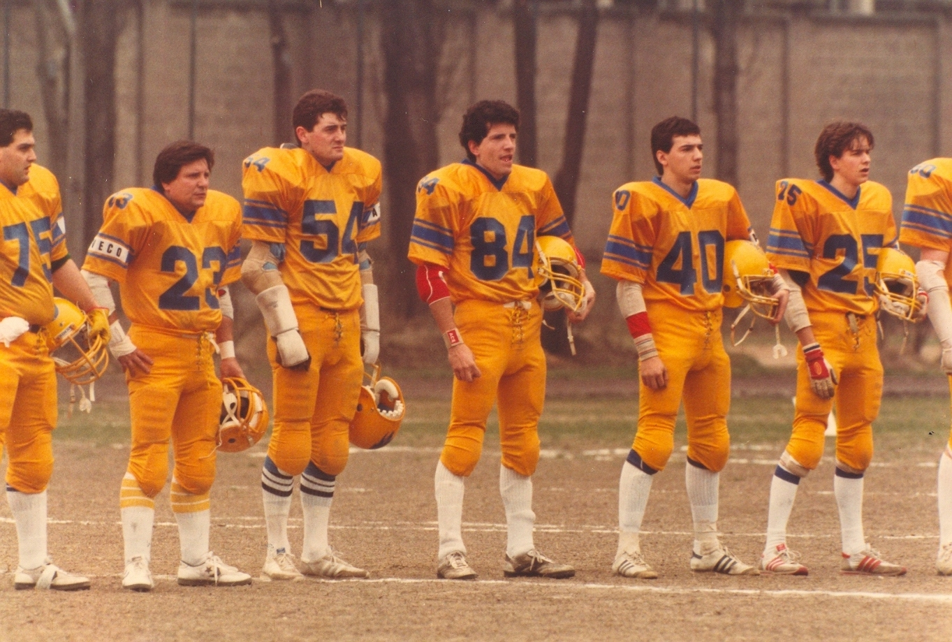 Football Ameicano in Italia 1984 Riders Sesto San Giovanni